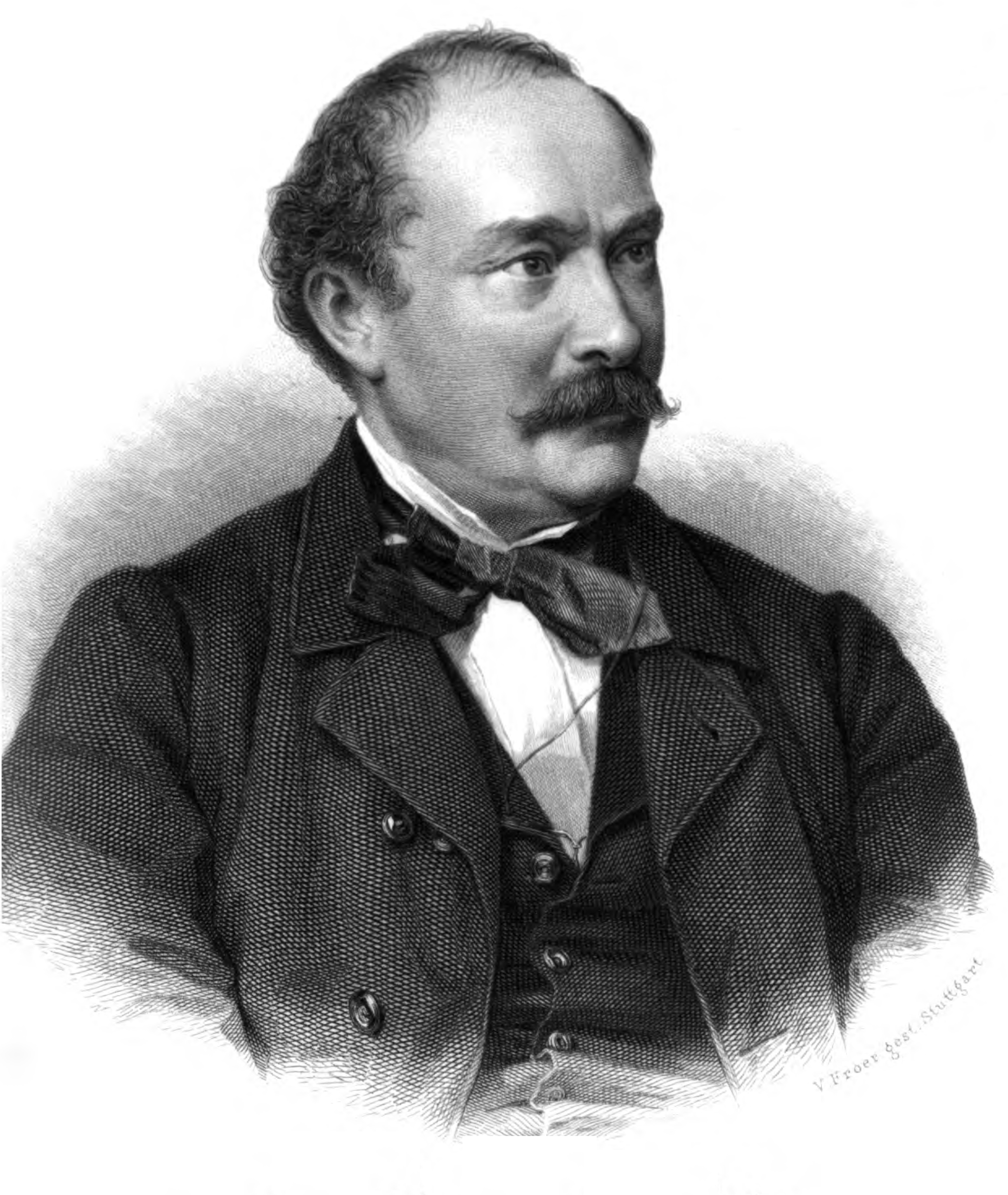 Porträt: Friedrich Wilhelm Hackländer. In: F. W. Hackländer’s Werke. Erste Gesammt-Ausgabe. Adolph Krabbe, Stuttgart, 1. Band, 2. Auflage, 1863